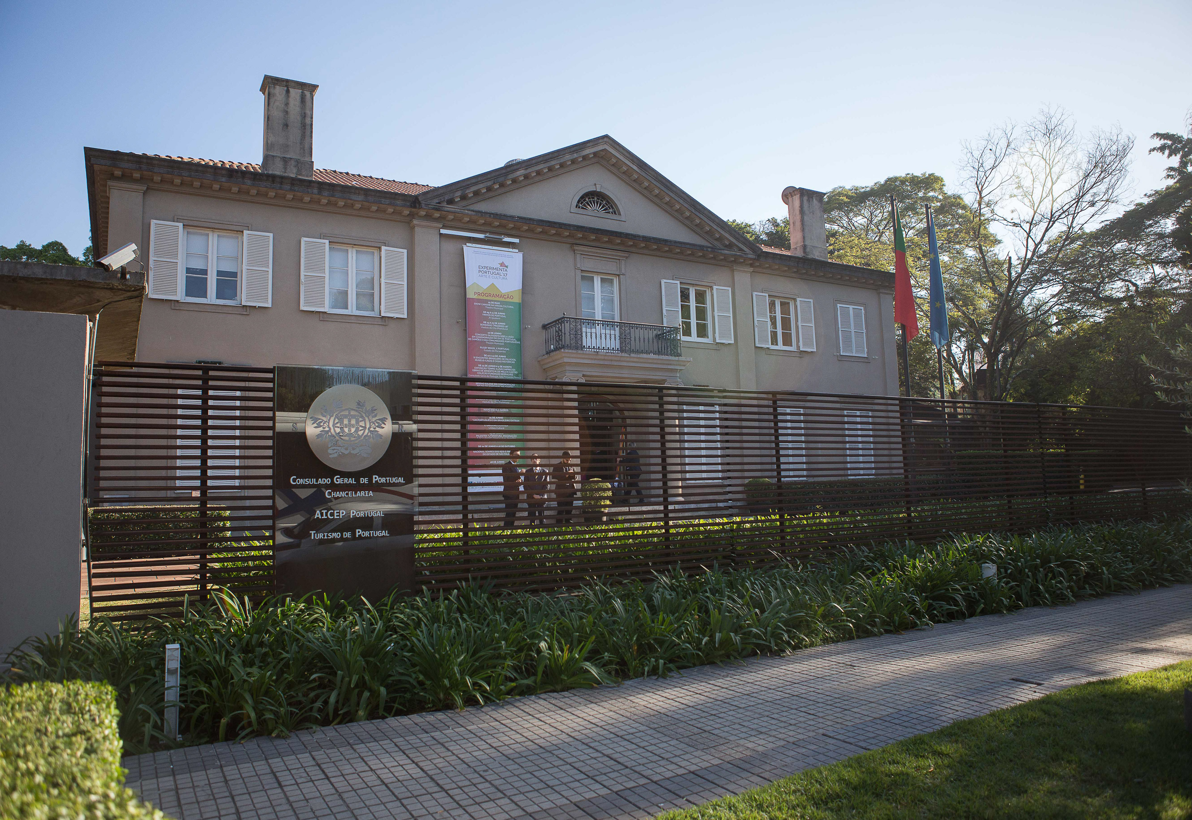 Parceria reúne apoio técnico para a recuperação, divulgação, intercâmbio de informações, agendas e exposições conjuntas